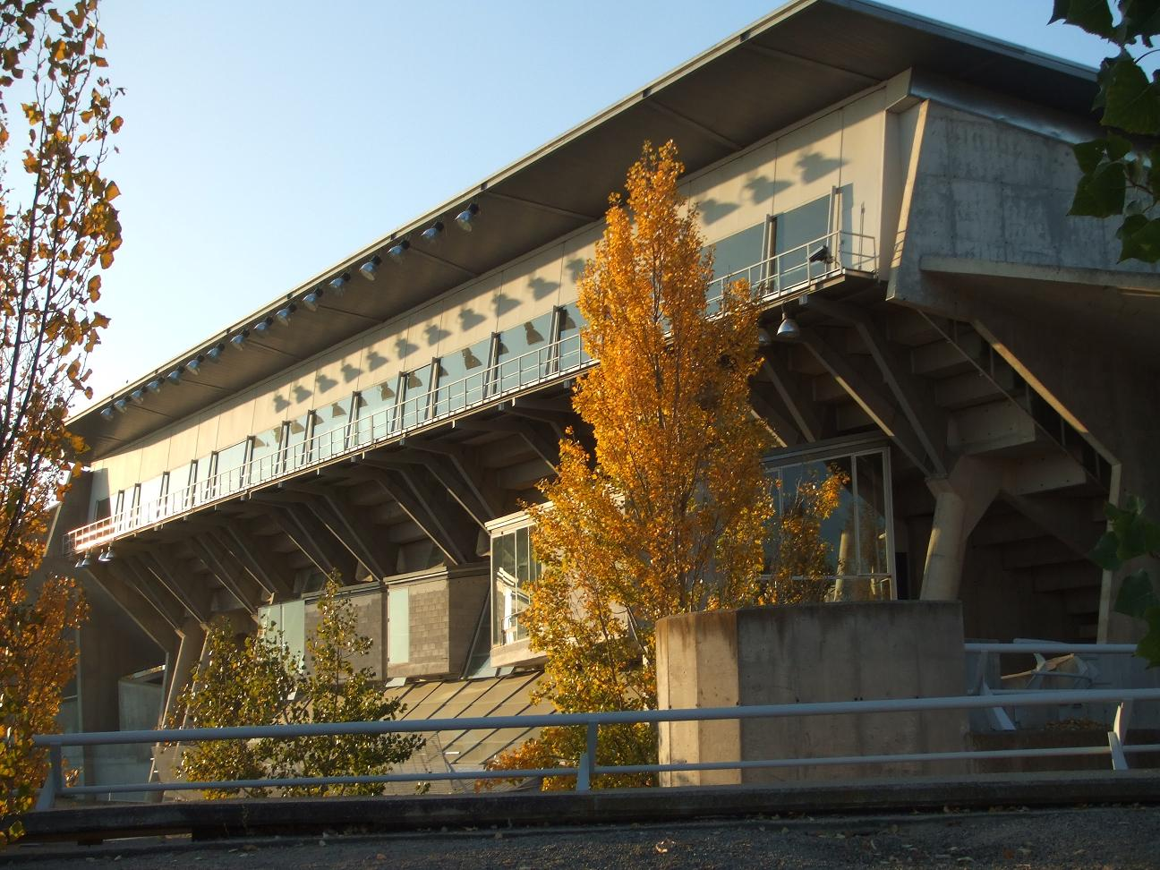 Polideportivo "Palacio de los deportes" de Huesca.